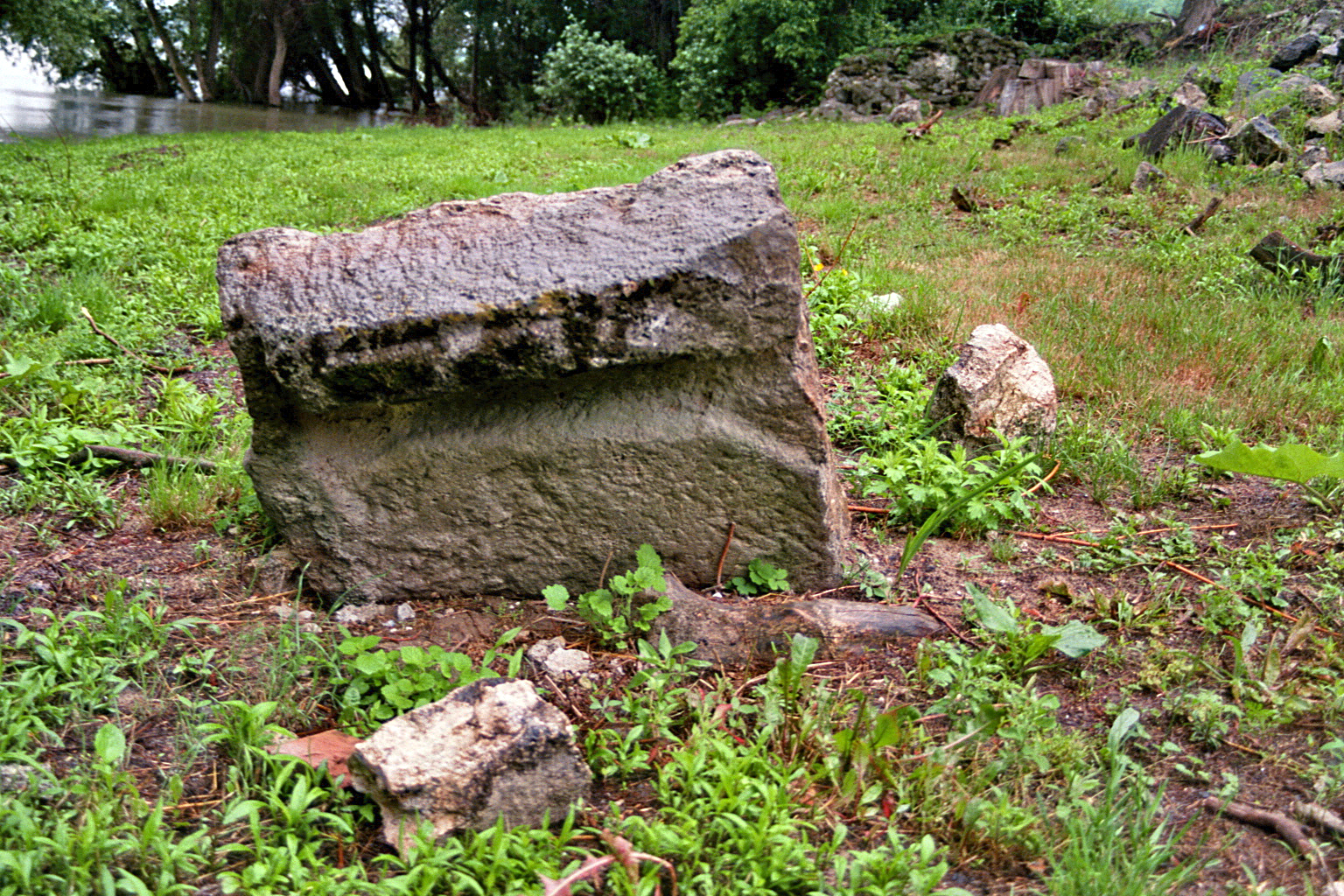 Burgus Szigetmonostor-Horány (Ungarn): Im Uferschlamm sitzende Spolie mit vom Fluß herausgerissenen Gesteinstrümmern und Ziegelresten. Die Aufnahme wurde im strömenden Regen gemacht.